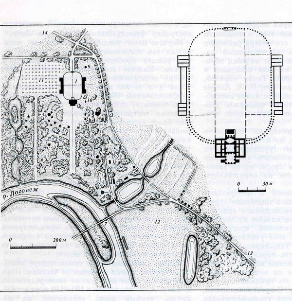 Lvov Znamensroje 1787: генплан садиби Знаменське-Райок